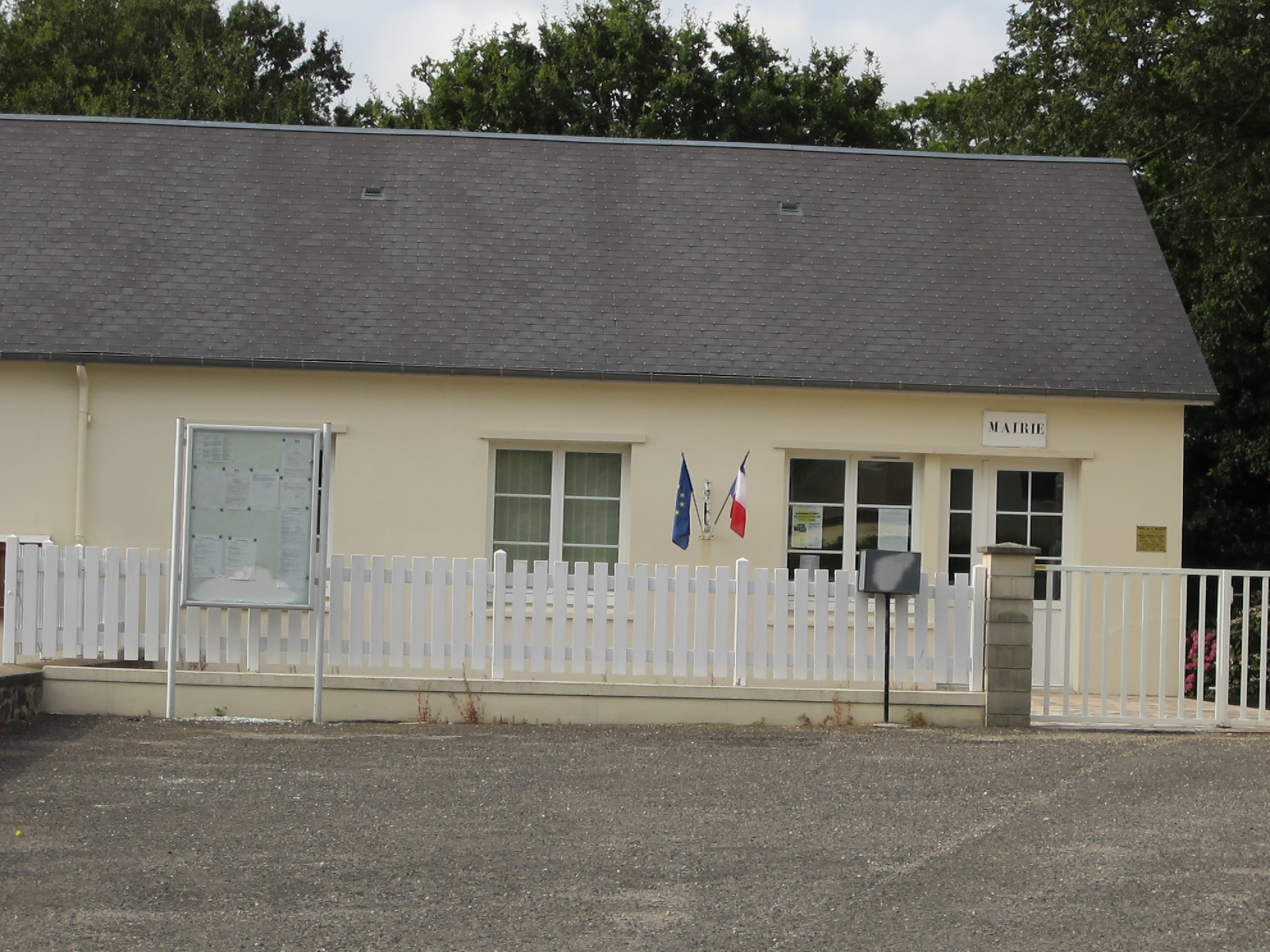 Valdécie